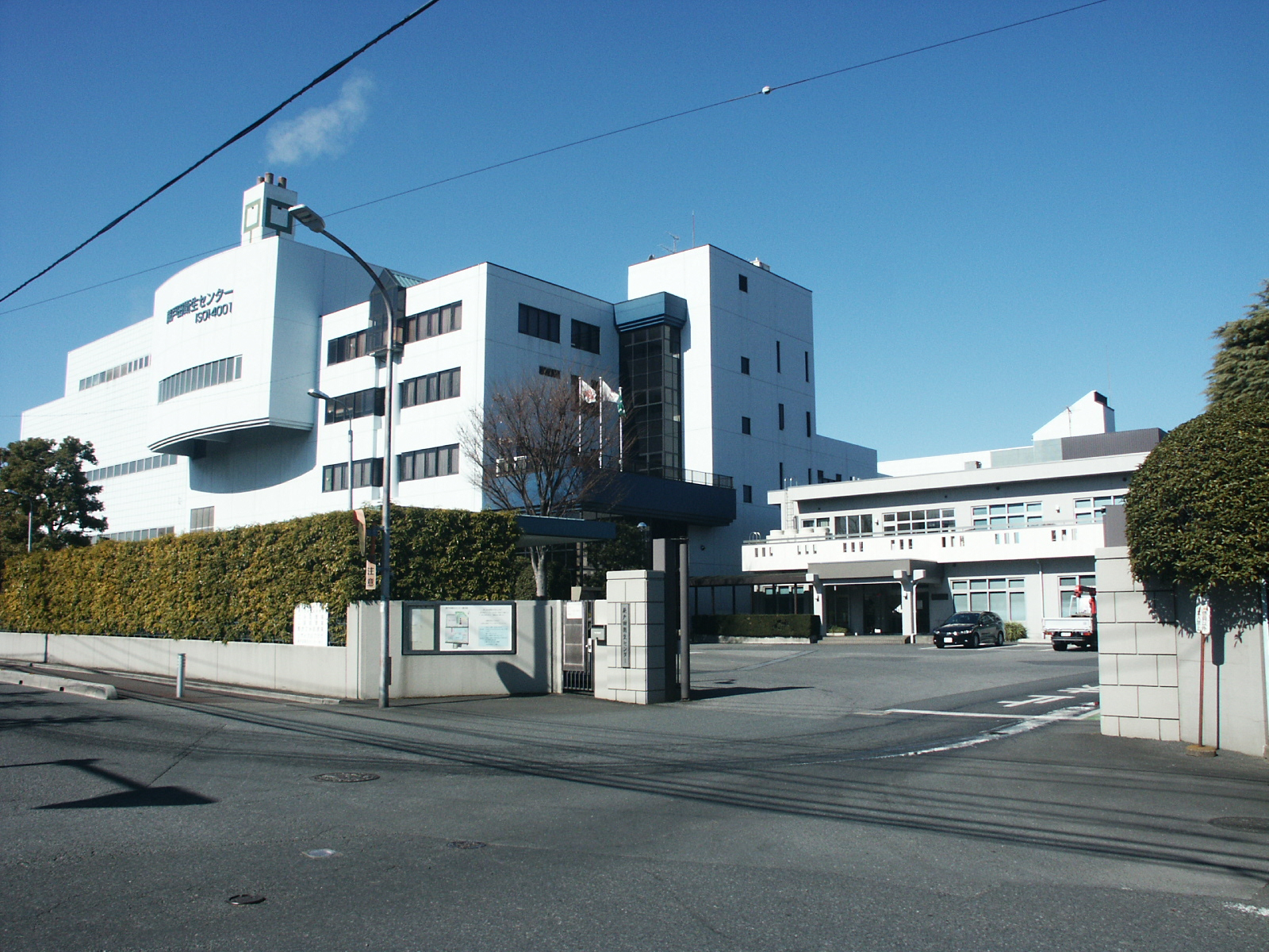 埼玉県戸田市に所在する蕨戸田衛生センター